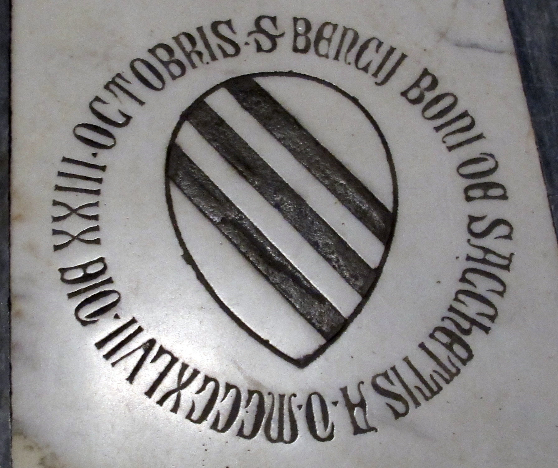 Smn, navata dx, tombe terragne 49 sacchetti